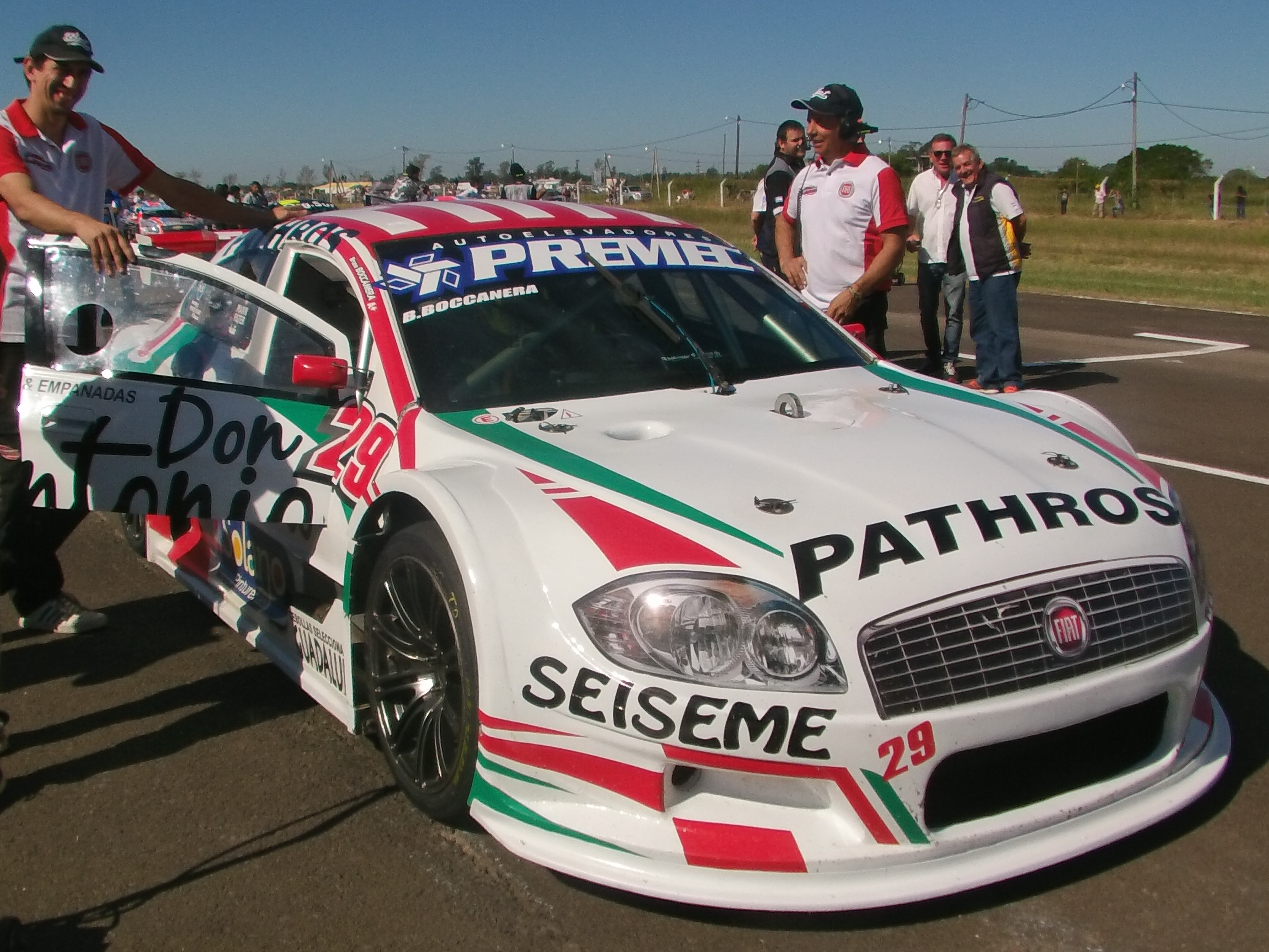 Bruno Boccanera, piloto argentino de automovilismo de velocidad, formado en la grilla de largada de la competencia del 30 de abril de 2017 en Resistencia Chaco, válida por la cuarta fecha la categoría argentina Top Race Series. Automóvil: Fiat Linea Series.